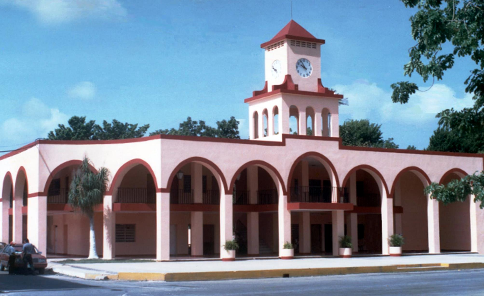 Palacio Municipal